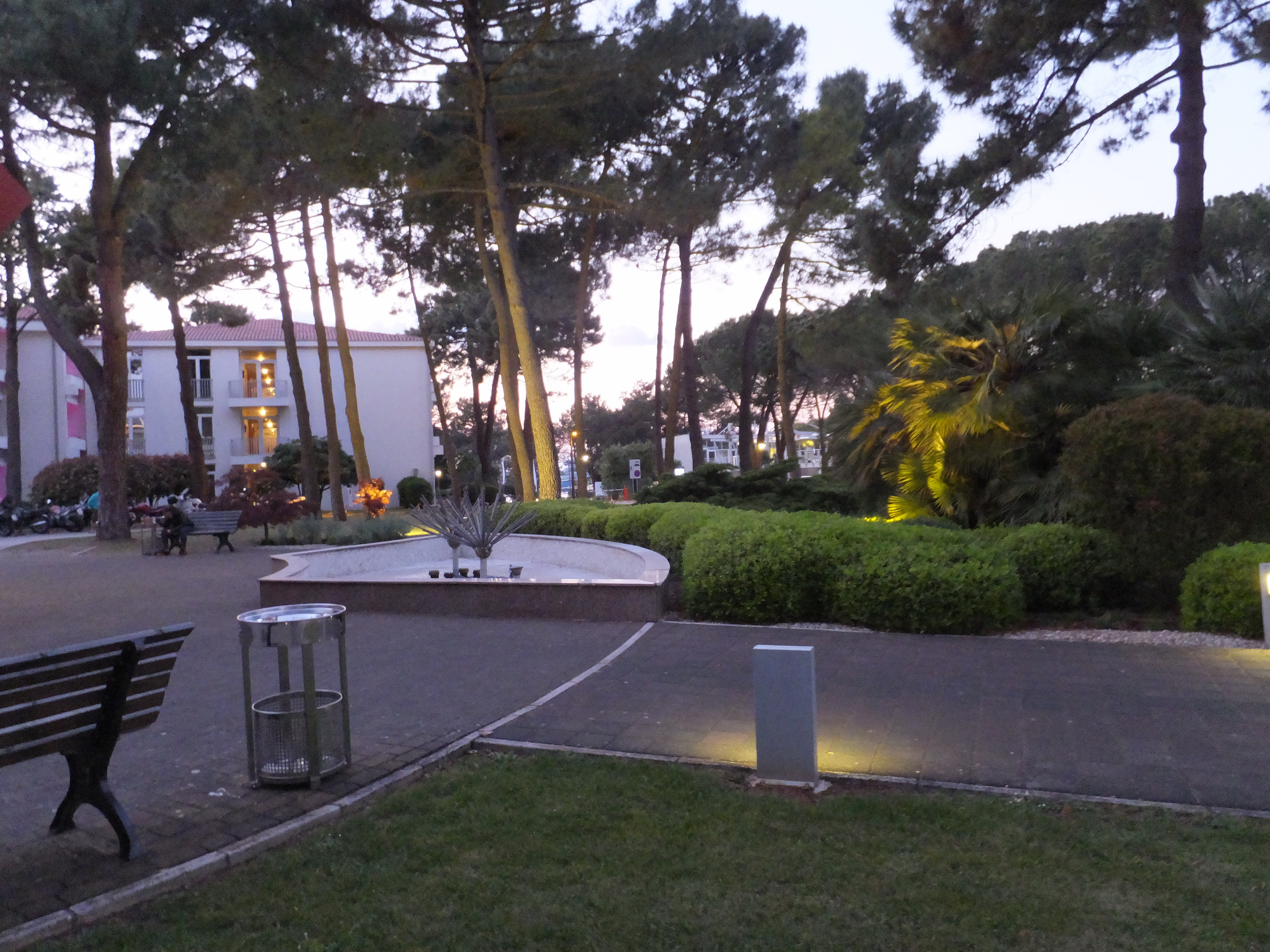 美麗珊瑚酒店 Melia Coral